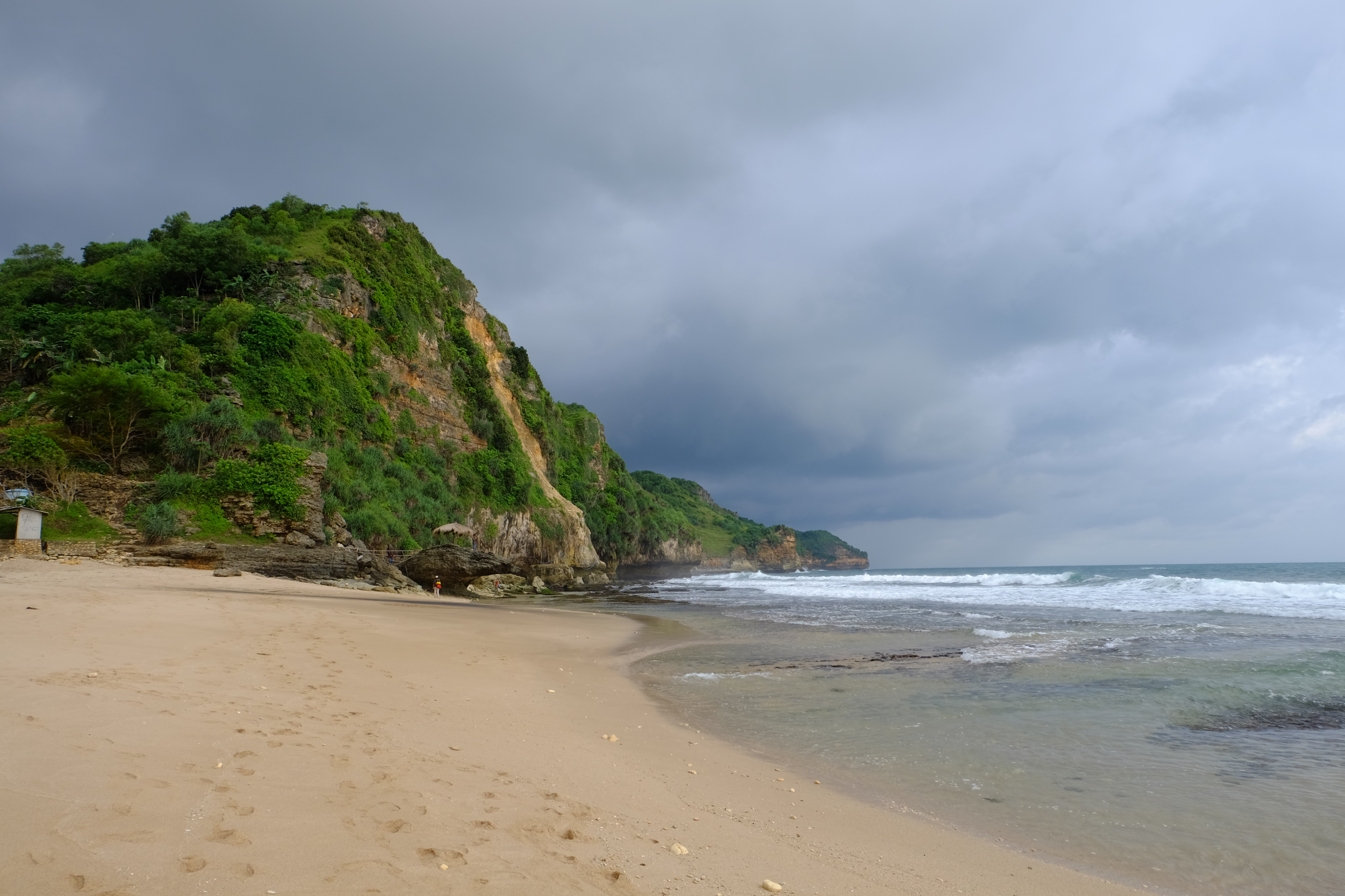 salah satu pantai yang berada di kawasan gunung kidul yogyakarta